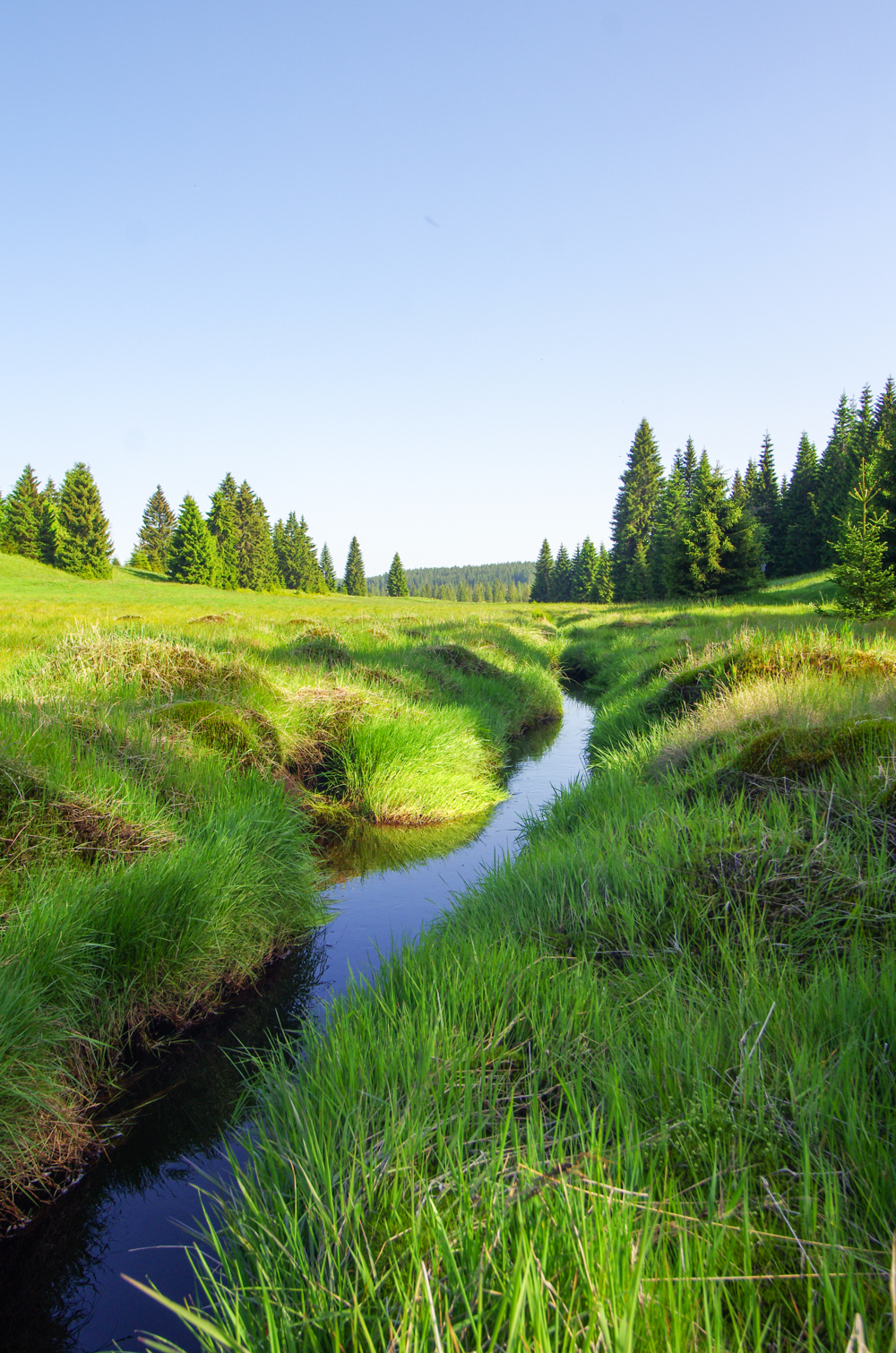 Národní přírodní rezervace Rolavská vrchoviště, v místě pod bývalou Červenou hájenkou, pohled na říčku Rolavu, okres Sokolov